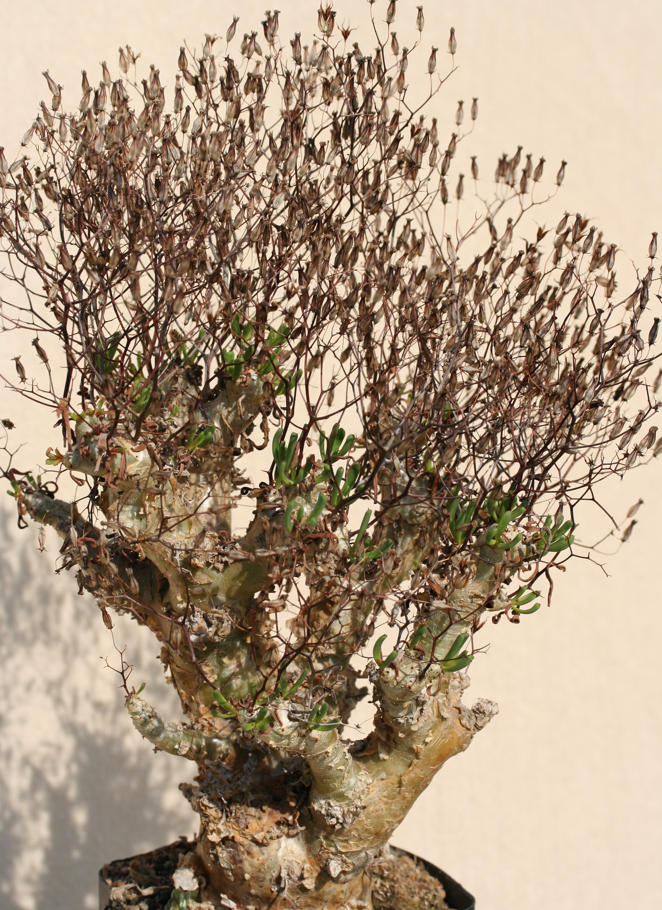 Tylecodon reticulatus, im Neuaustrieb